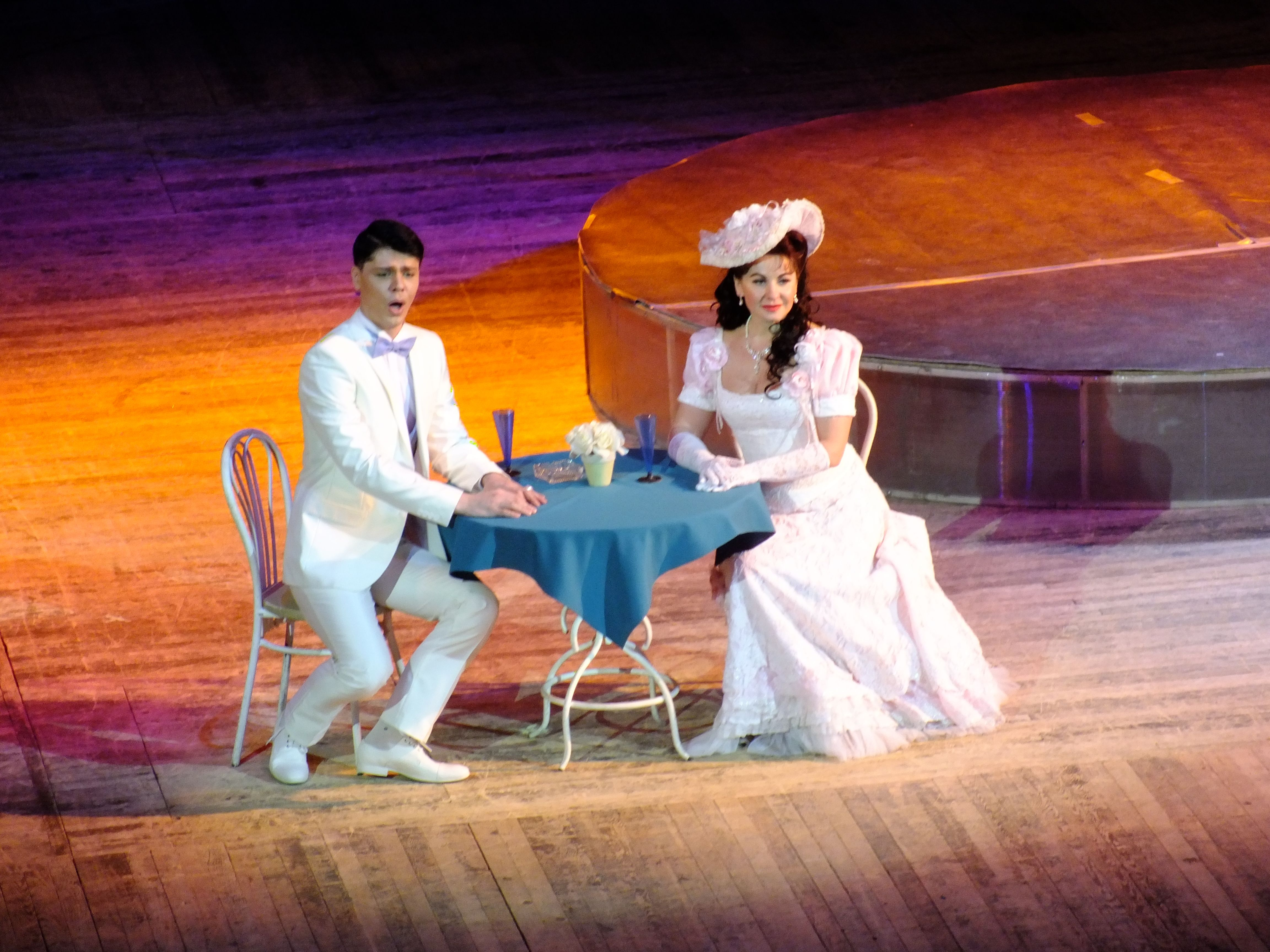 Хабаровский краевой музыкальный театр